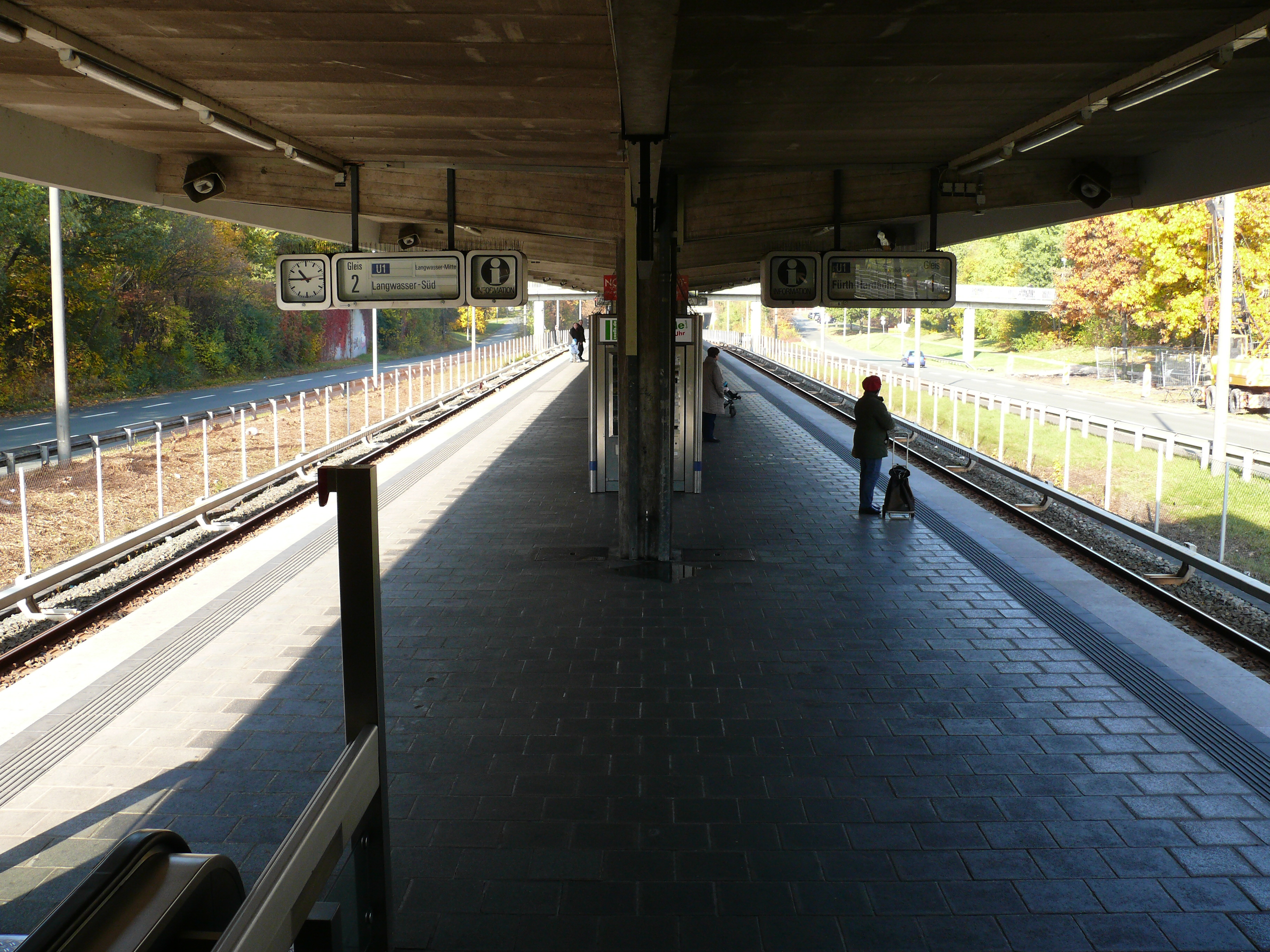 Blick auf den Bahnsteig am U-Bahnhof Langwasser Nord in Nürnberg.